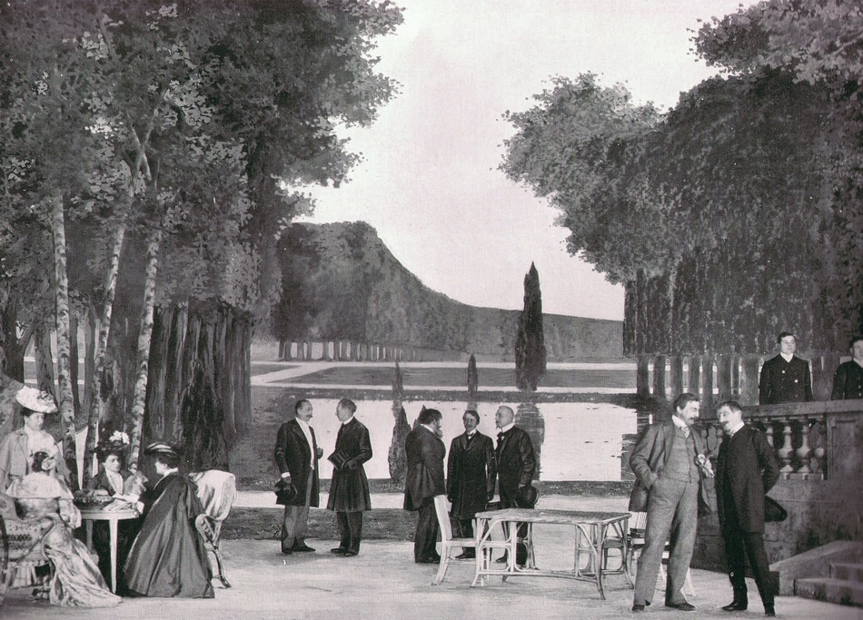 Les affaires sont les affaires, d'Octave Mirbeau (1848-1917)